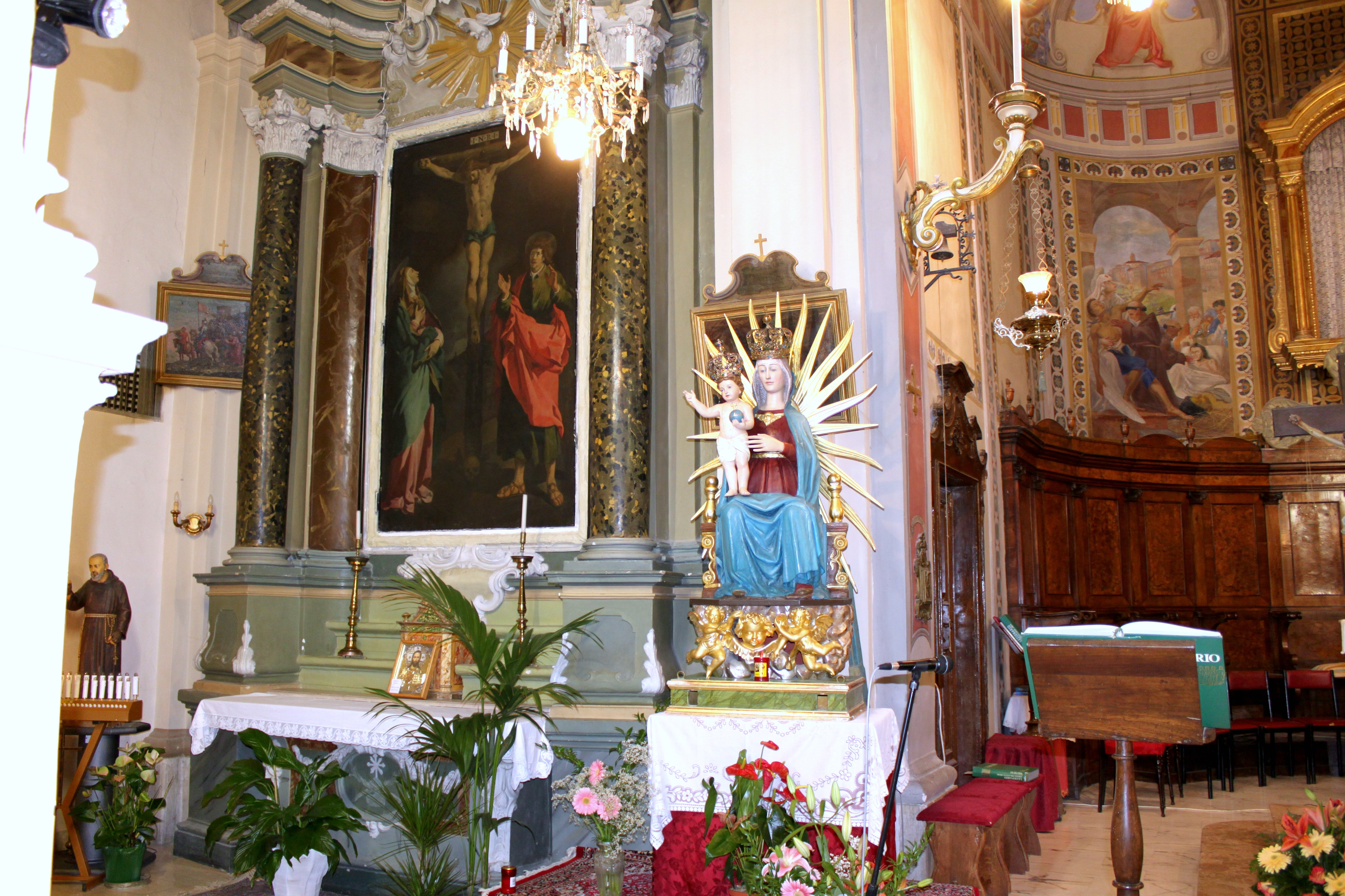 Cappella sinistra della Chiesa di Santa Maria del Buon Gesù a Carassai